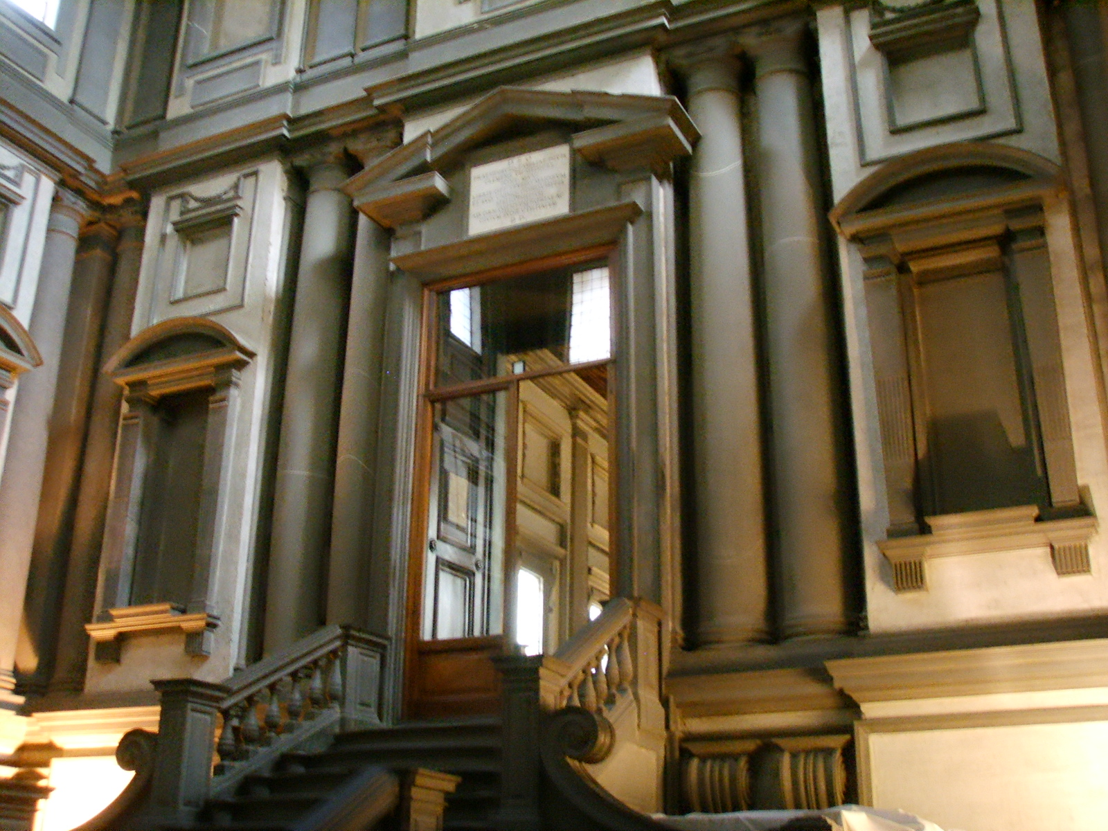 Biblioteca medicea laurenziana vestibolo